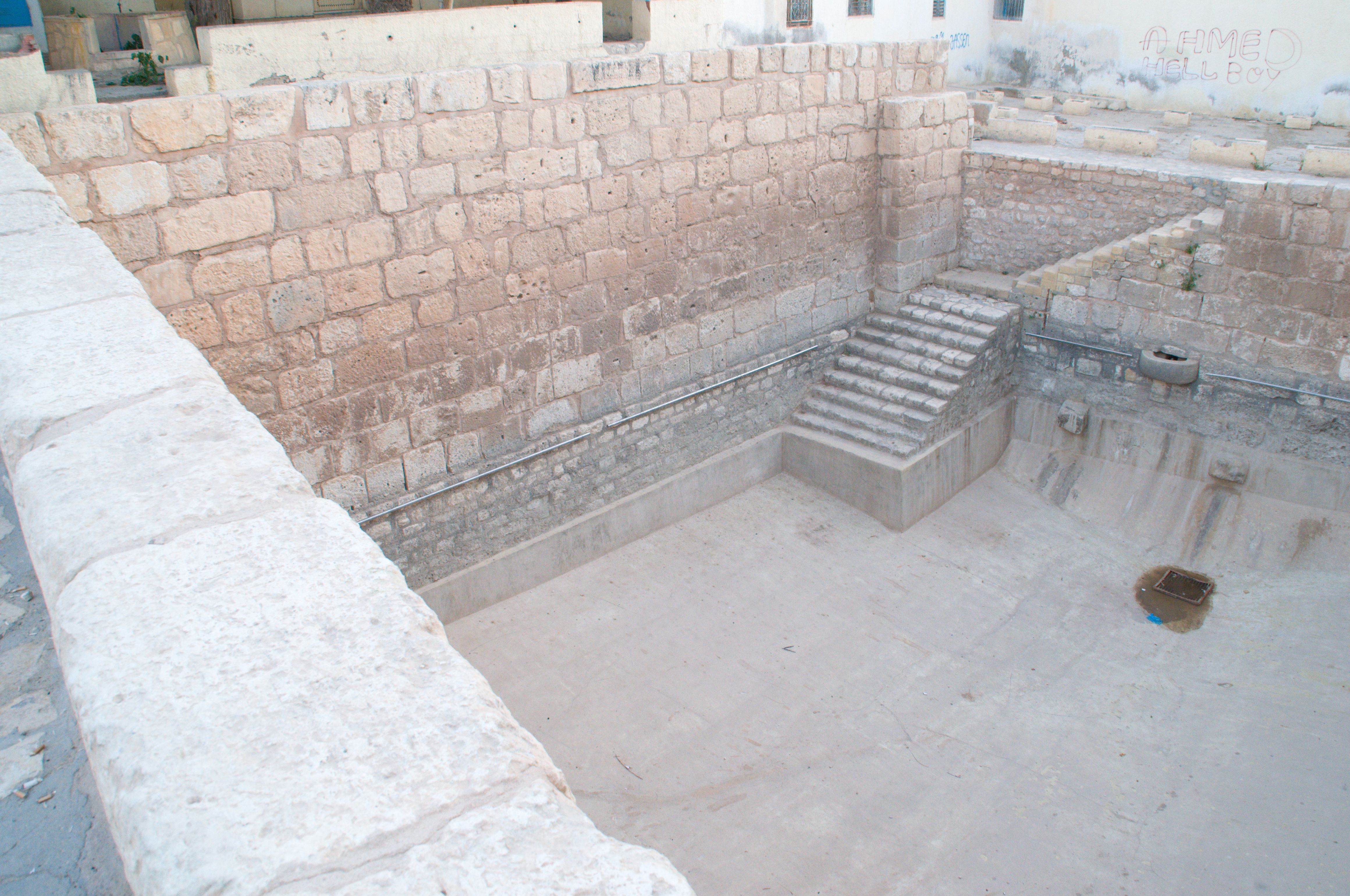 Piscines dites « Termil », Gafsa